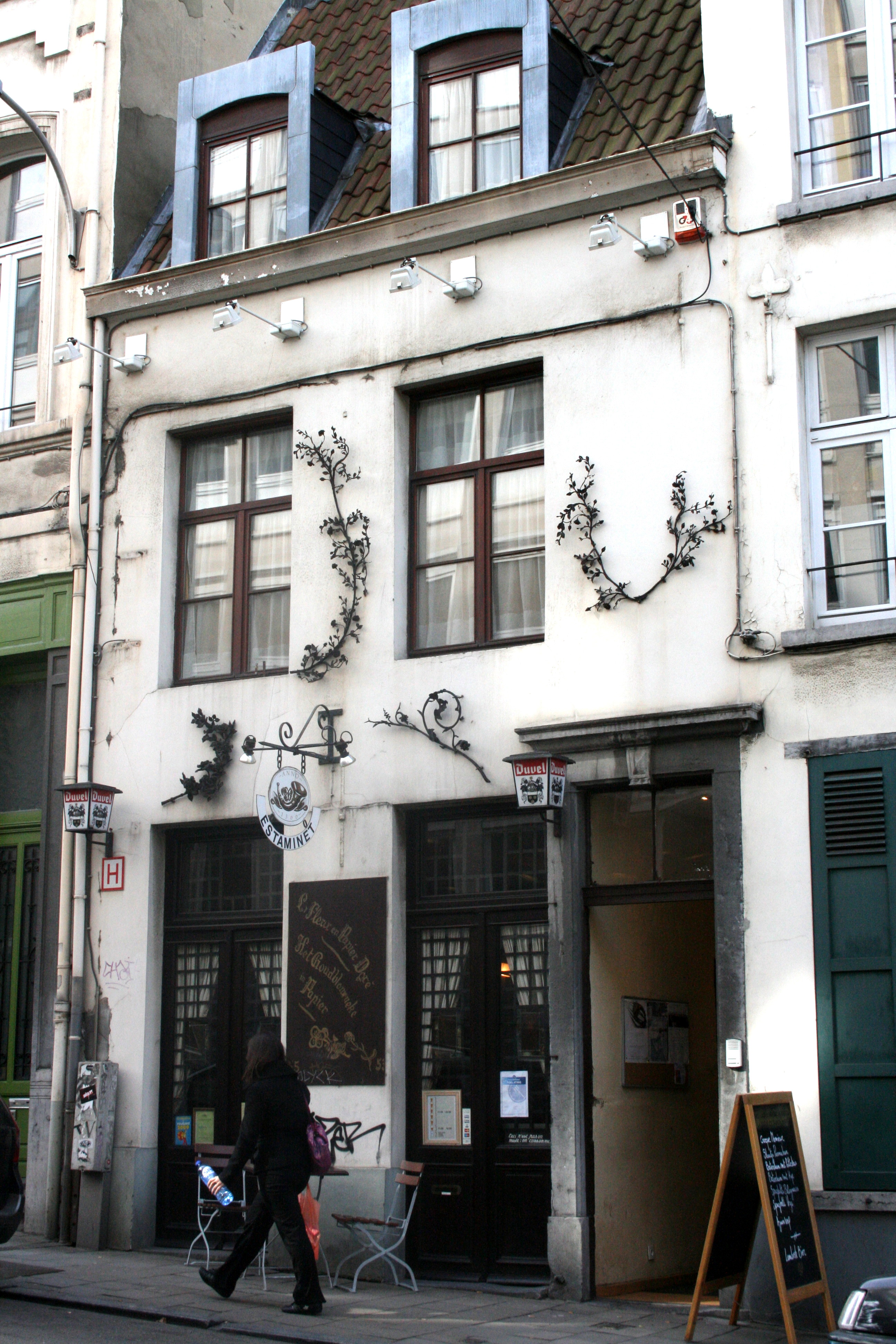 Rue des Alexiens 55, Bruxelles (Belgique). La Fleur en Papier Doré